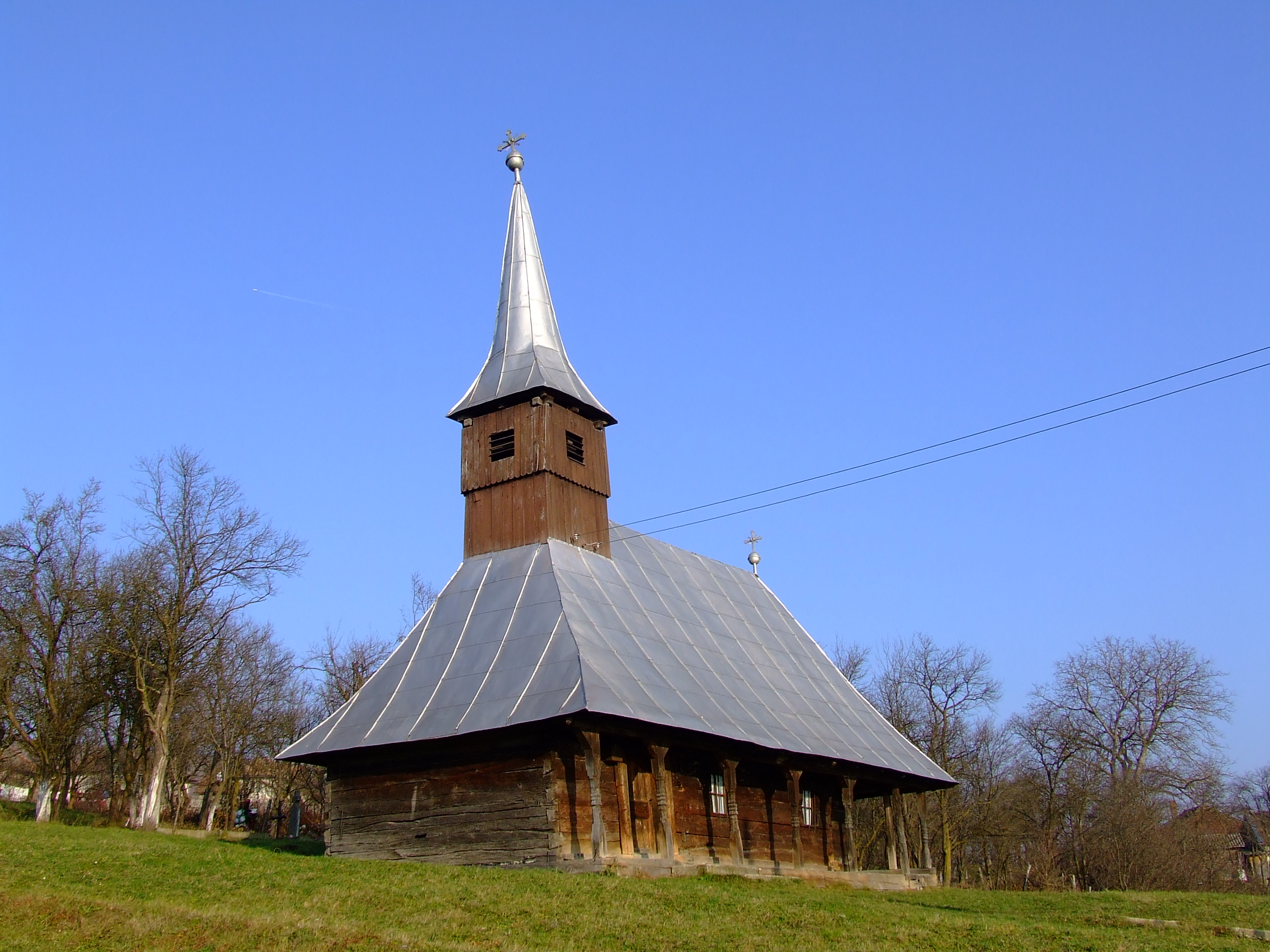 Biserica de lemn din Turbuţa, judeţul Sălaj. Autor: Bogdan Ilieş Data: noiembrie 2006